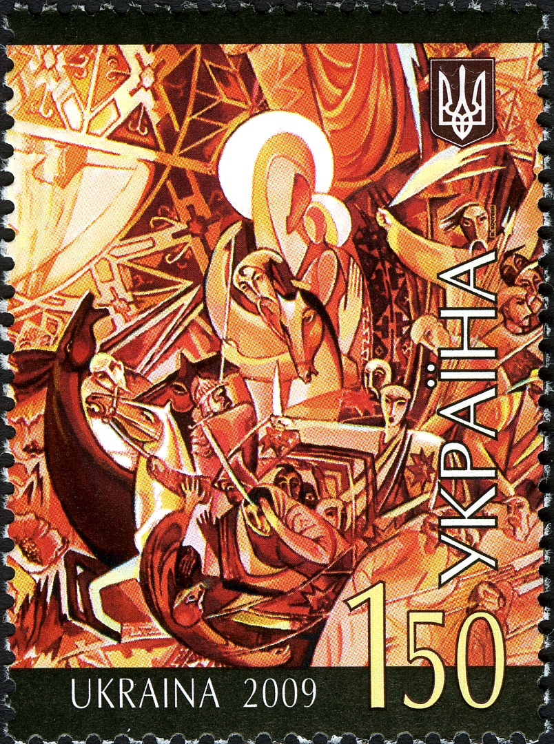 Поштова марка України "Гайдамацькі пісні"